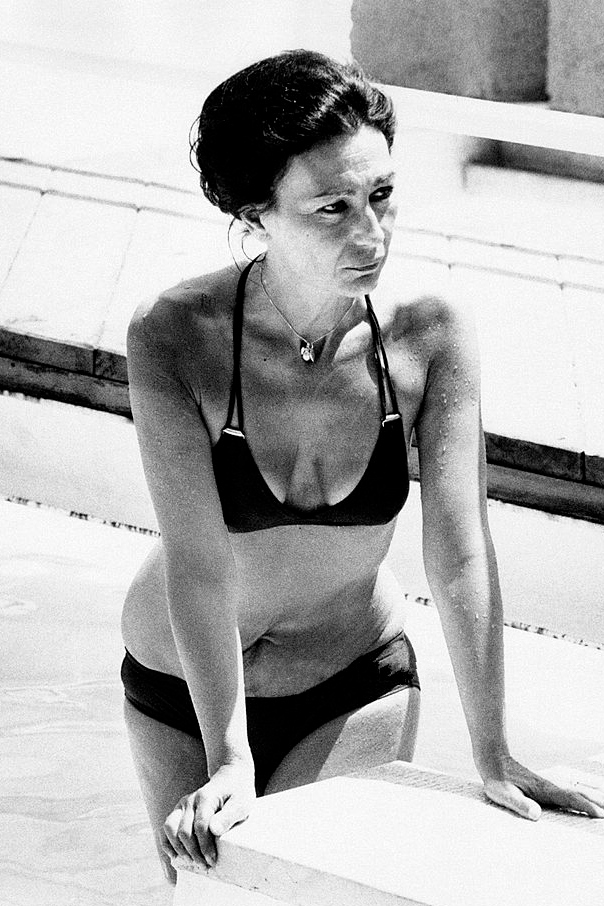 Flora Carabella